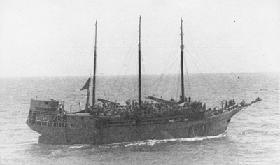 אוניית המעפילים י"ד חללי גשר הזיו